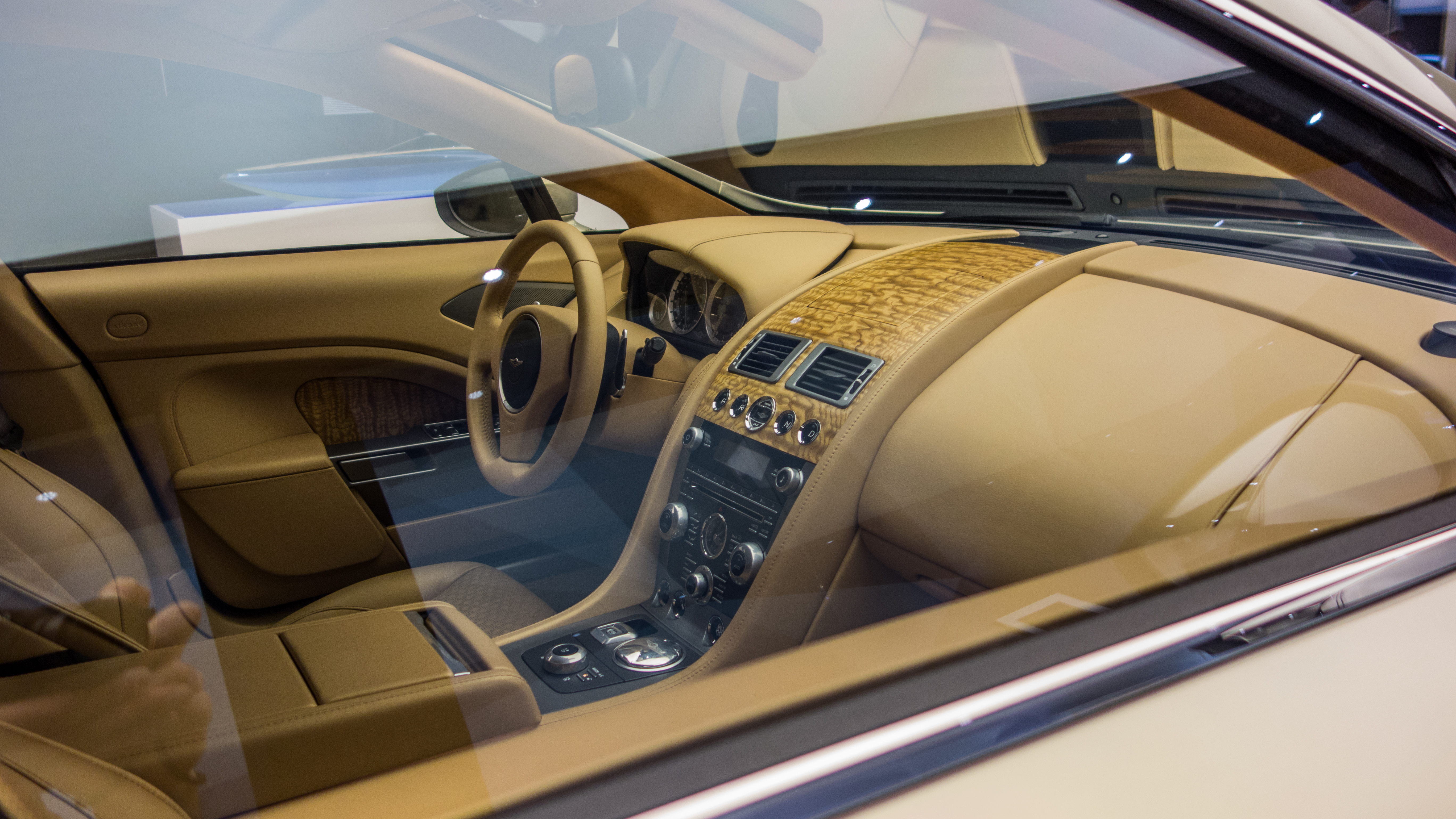 Aston Martin Lagonda 2015 V12 6.0 556cv 600N.m 5 mètre de long, 200ex 800 000€